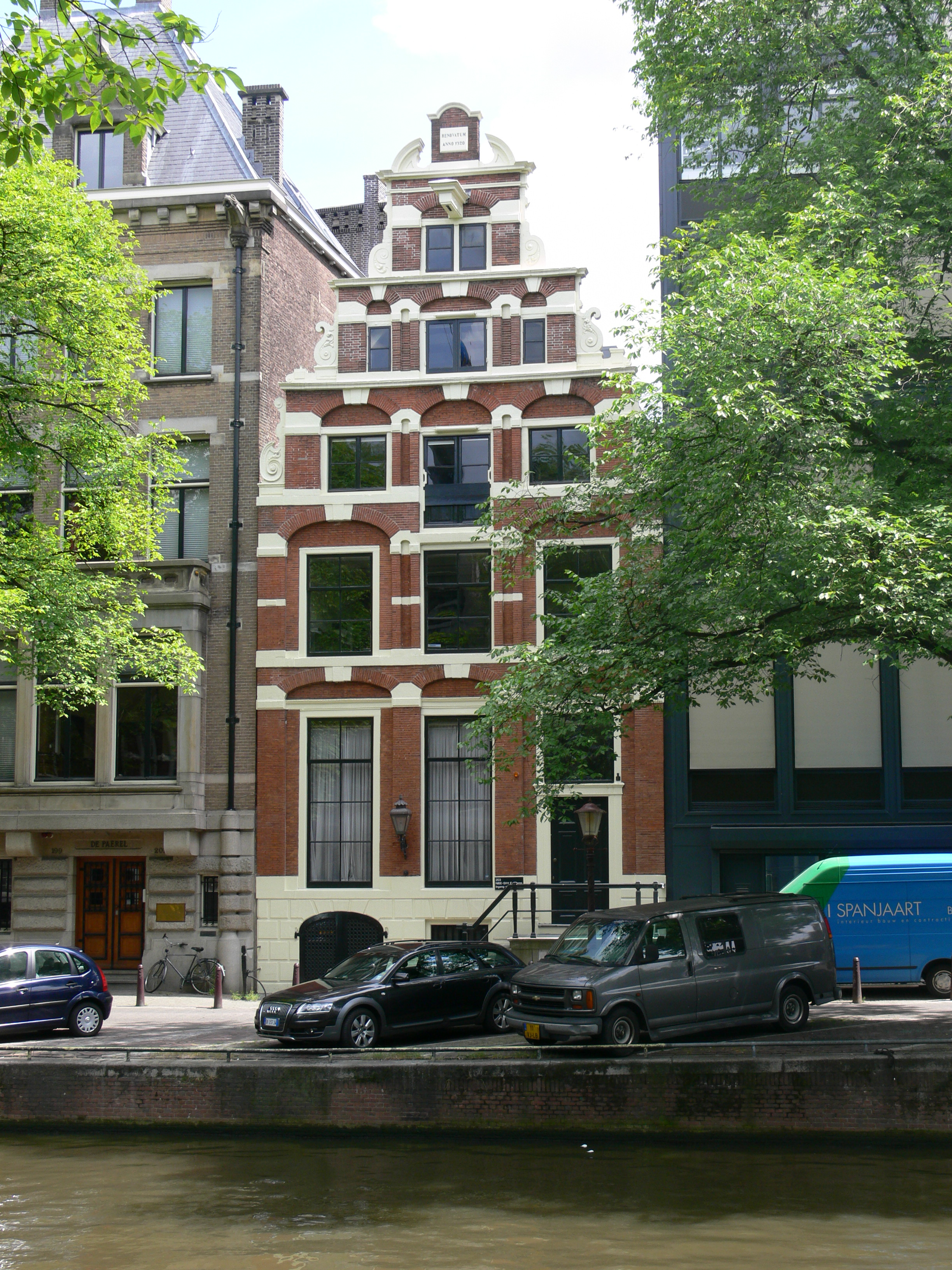 Koopmanshuis, Herengracht 203, Amsterdam